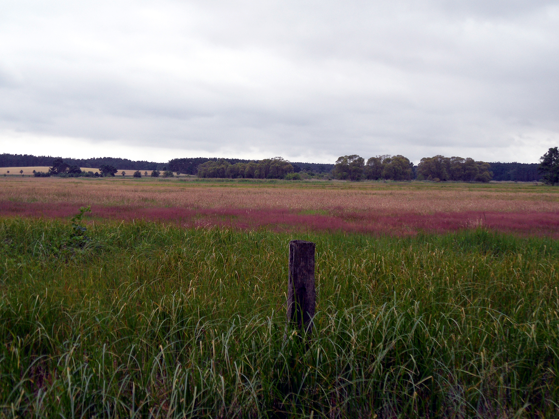 Naturschutzgebiet Wischsee bei Prenden, Gemeinde Wandlitz – Die Färbung kommt durch blühenden Sauerampfer und rötliche Gräser zustande.